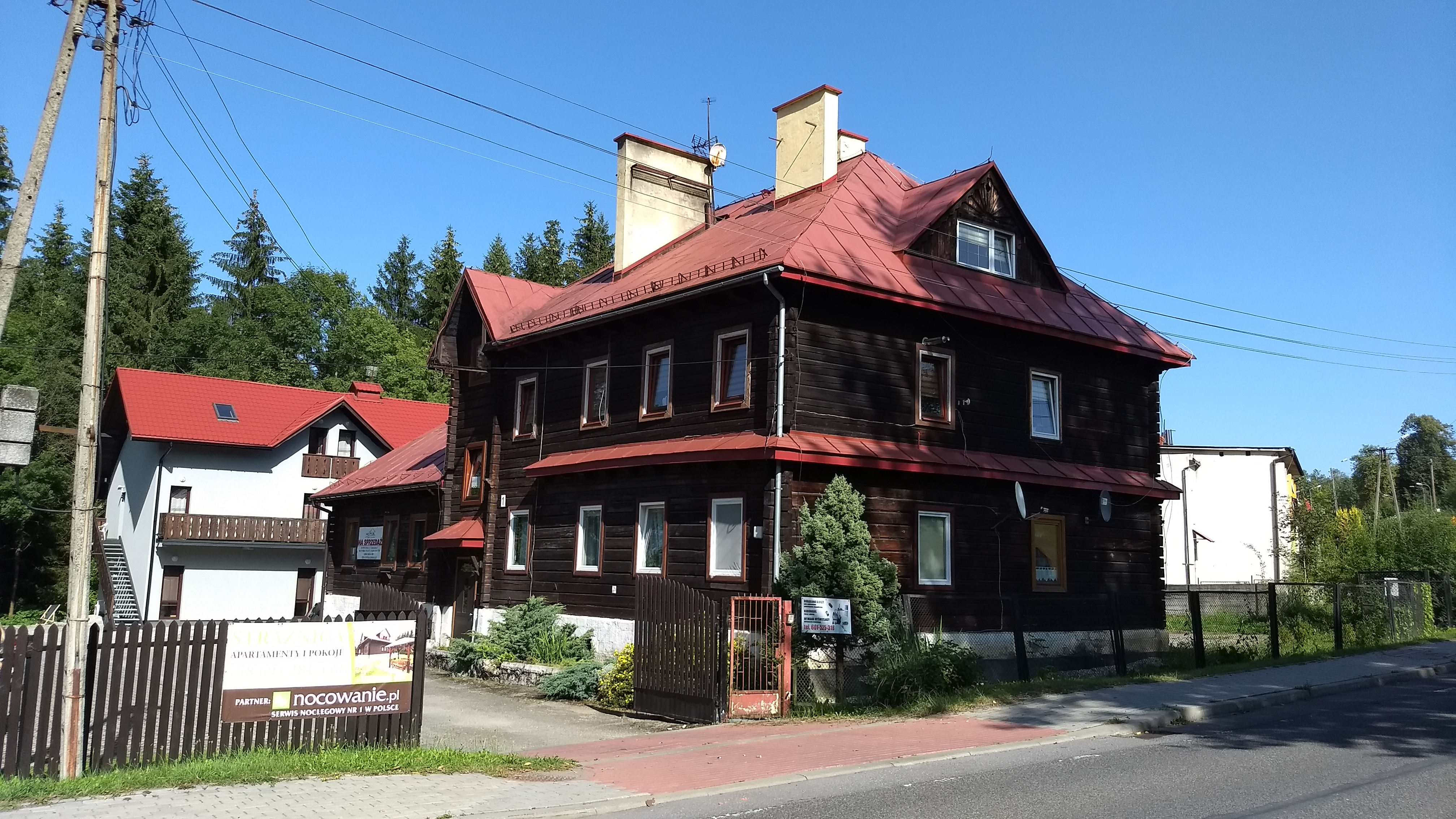 Jaworzynka, była Strażnica Wojsk Ochrony Pogranicza (WOP) Jaworzynka, następnie Strażnica Straży Granicznej (SG) w Jaworzynce, od 24.08.2005 do 15.01.2008 roku placówka Straży Granicznej. Obecnie prywatne budynki